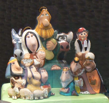 Pessebre fet amb pasta de paper. Hi apareixen, com és tradicional a Catalunya, el nen, el pare i la mare, el bou i la mula, els tres reis mags, el caganer i els pastors.